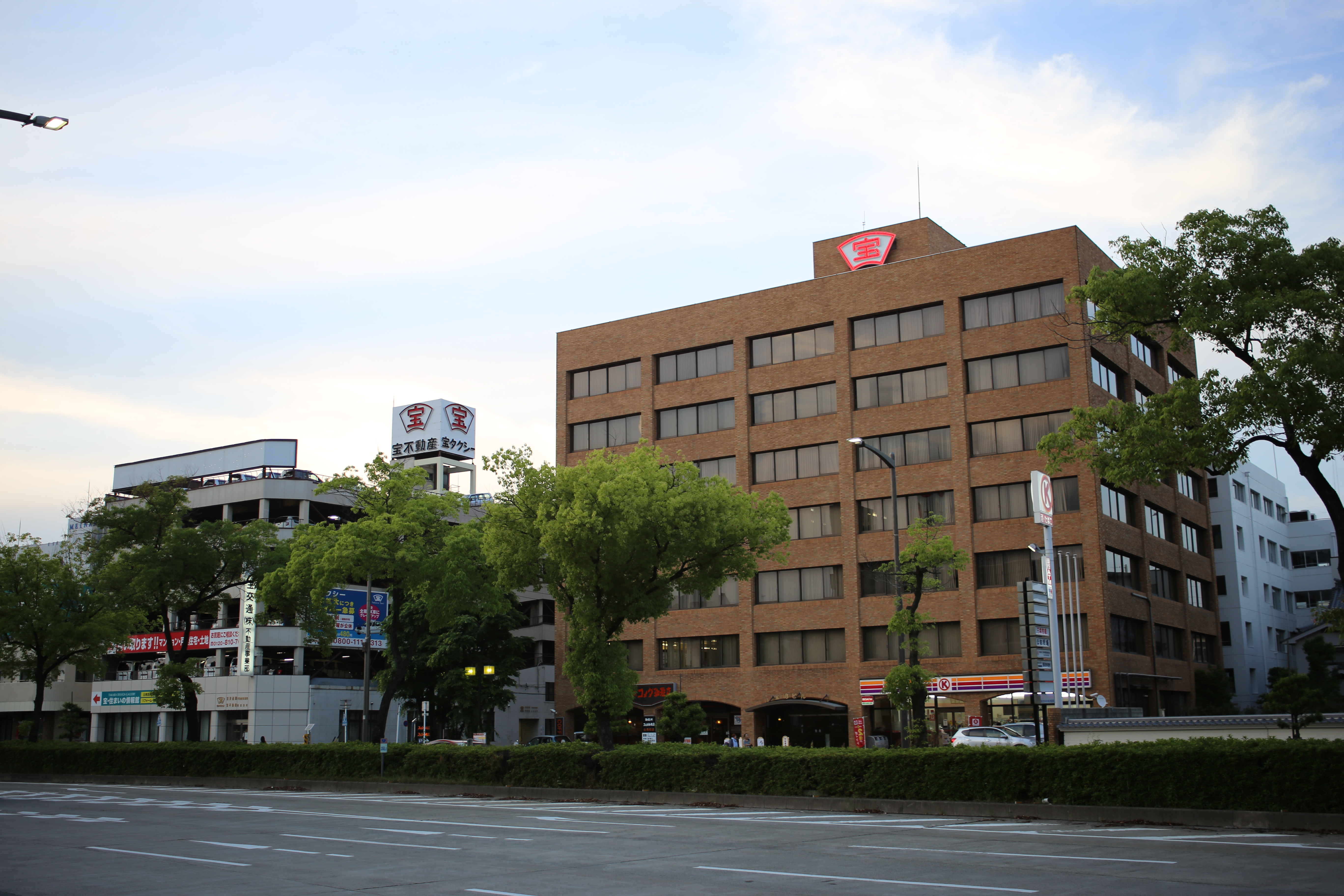 名古屋市熱田区神宮四丁目の宝18ビル（右）と宝第二ビル（左）を南側公道東側より撮影